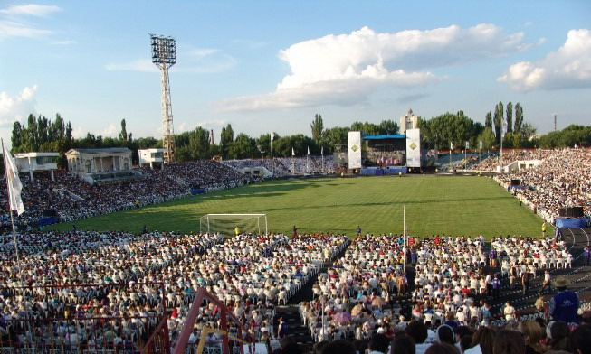 Фестиваль Надежды в Кишинёве, 2005 год